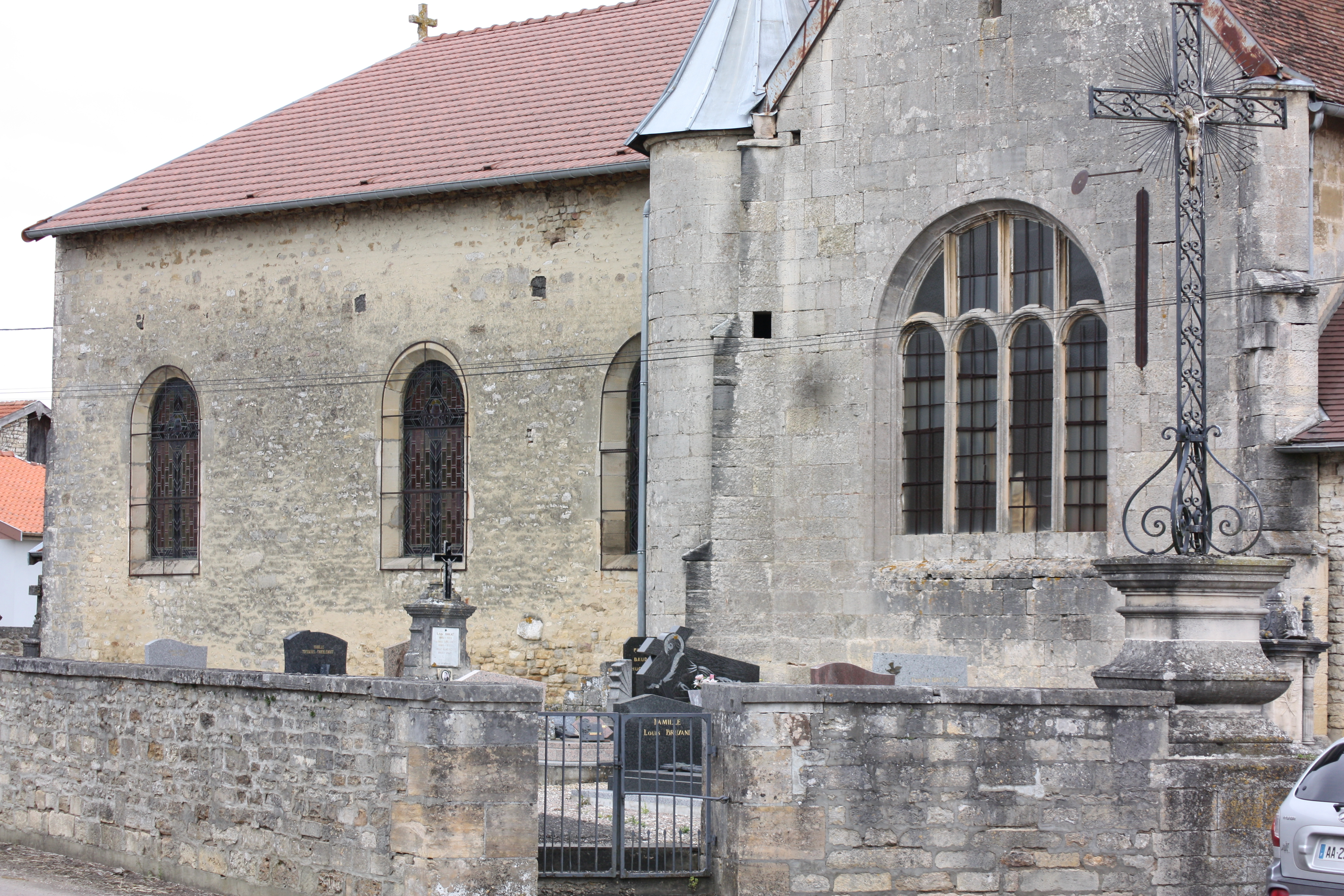 Morancourt - Eglise Saint-Pierre-ès-Liens Vue générale